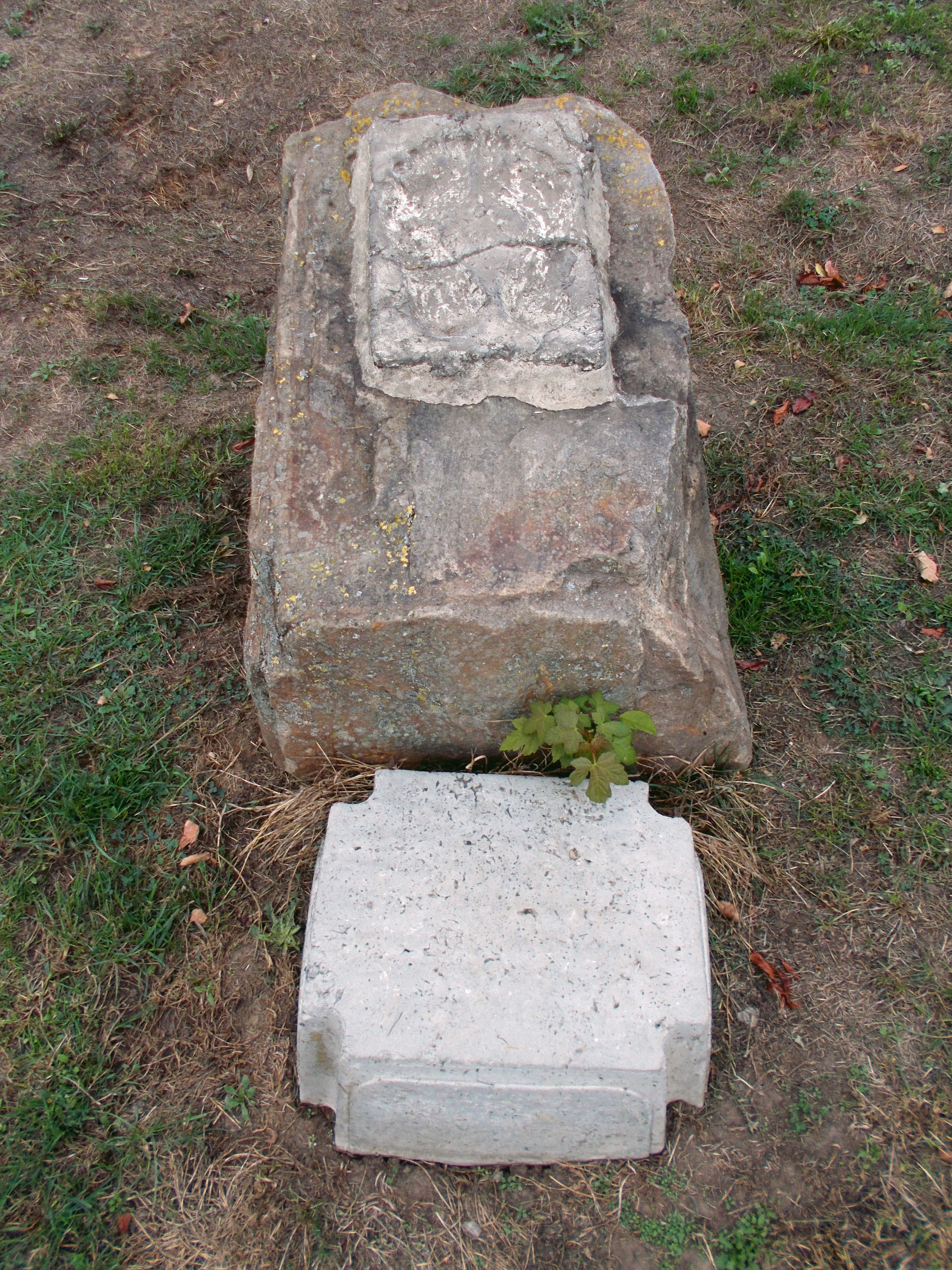 Zu Ehren Emil von Behring gestaltete 2013 die Mülheimer Künstlergruppe "AnDer" e. V. den Von-Behring-Platz. Skulptur "Speakers‘ Corner" von Jochen Leyendecker.